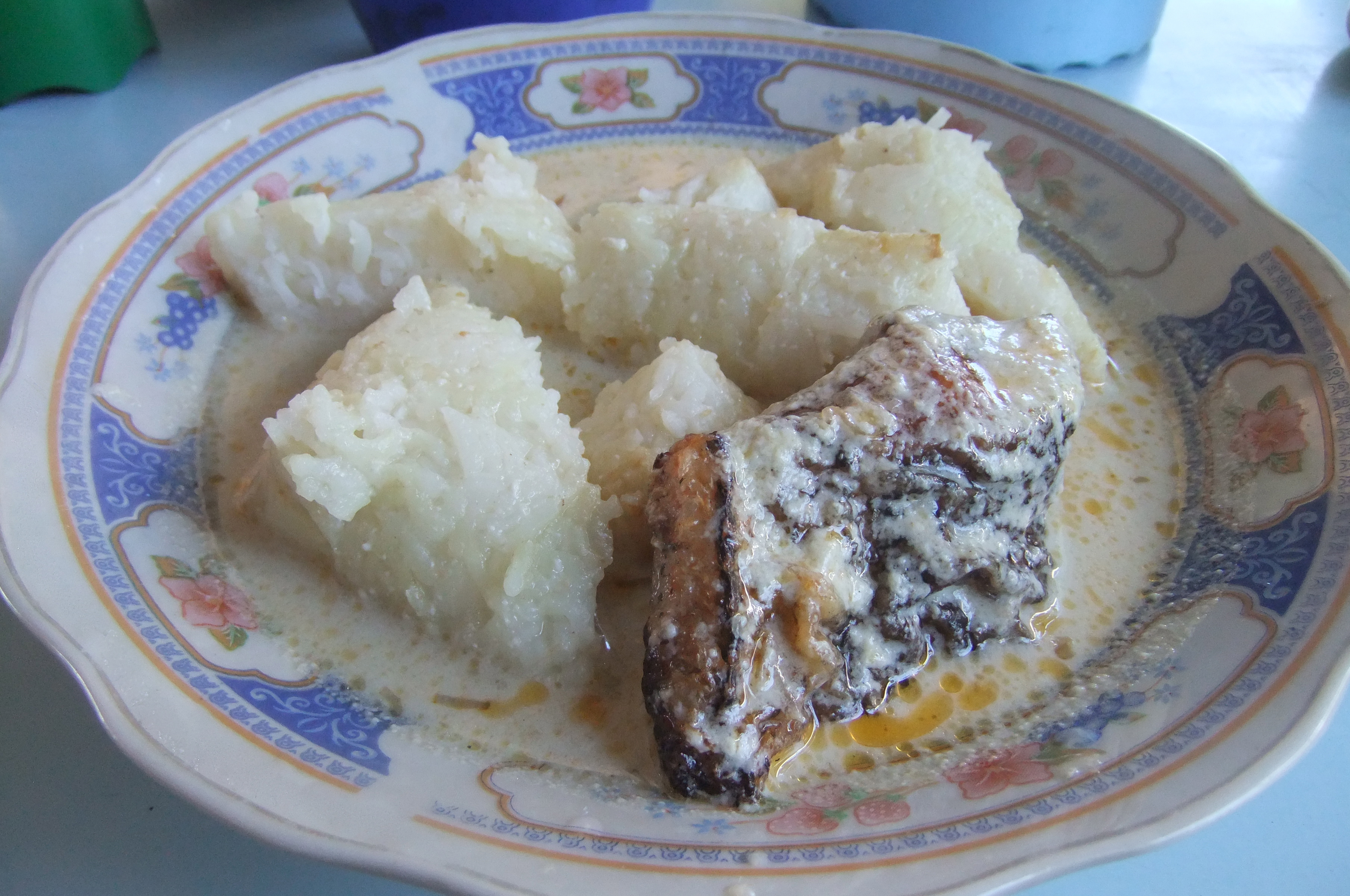 Ketupat Kandangan di Kandangan